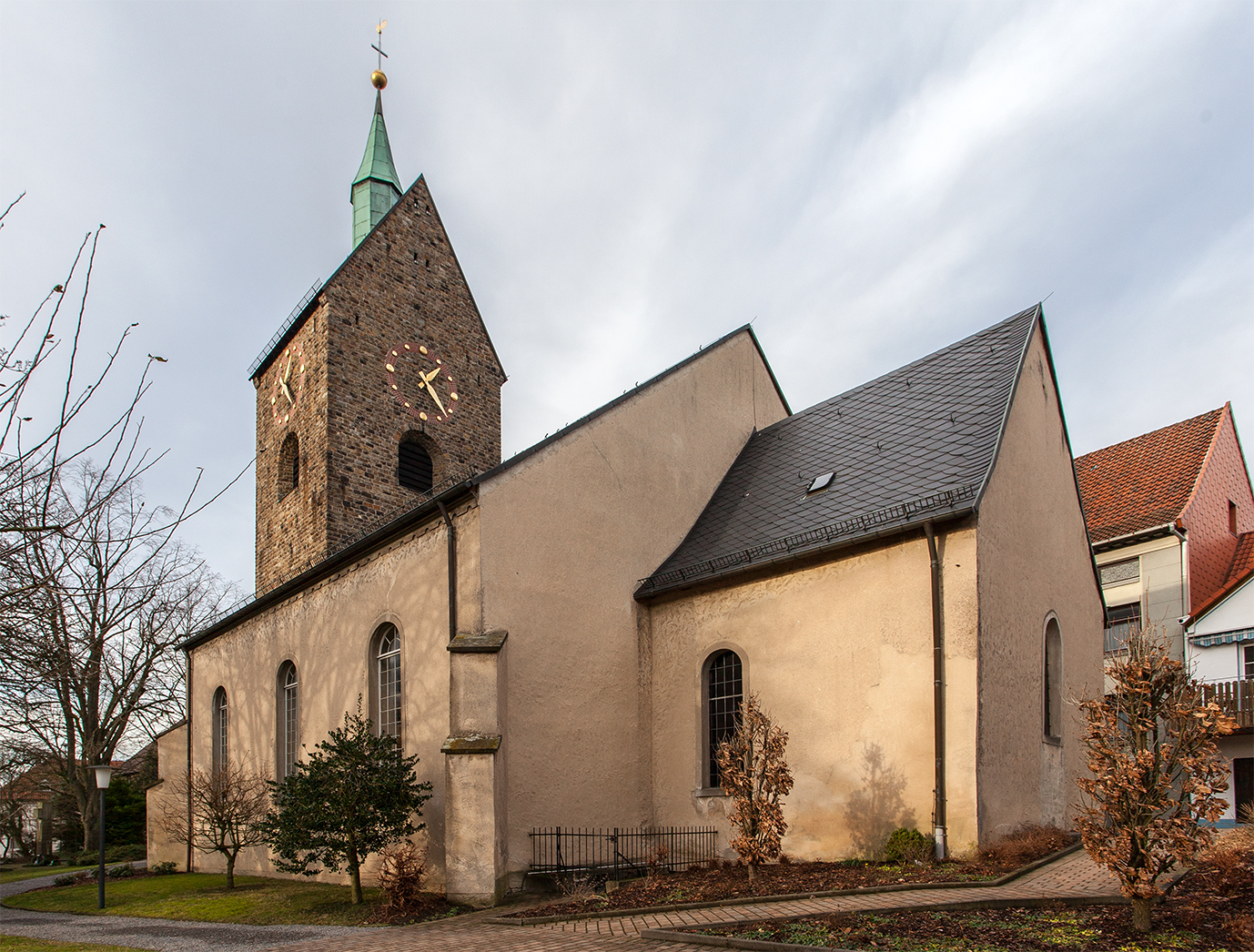 Evangelische Kirche Bösingfeld (Extertal) This is a photograph of an architectural monument.